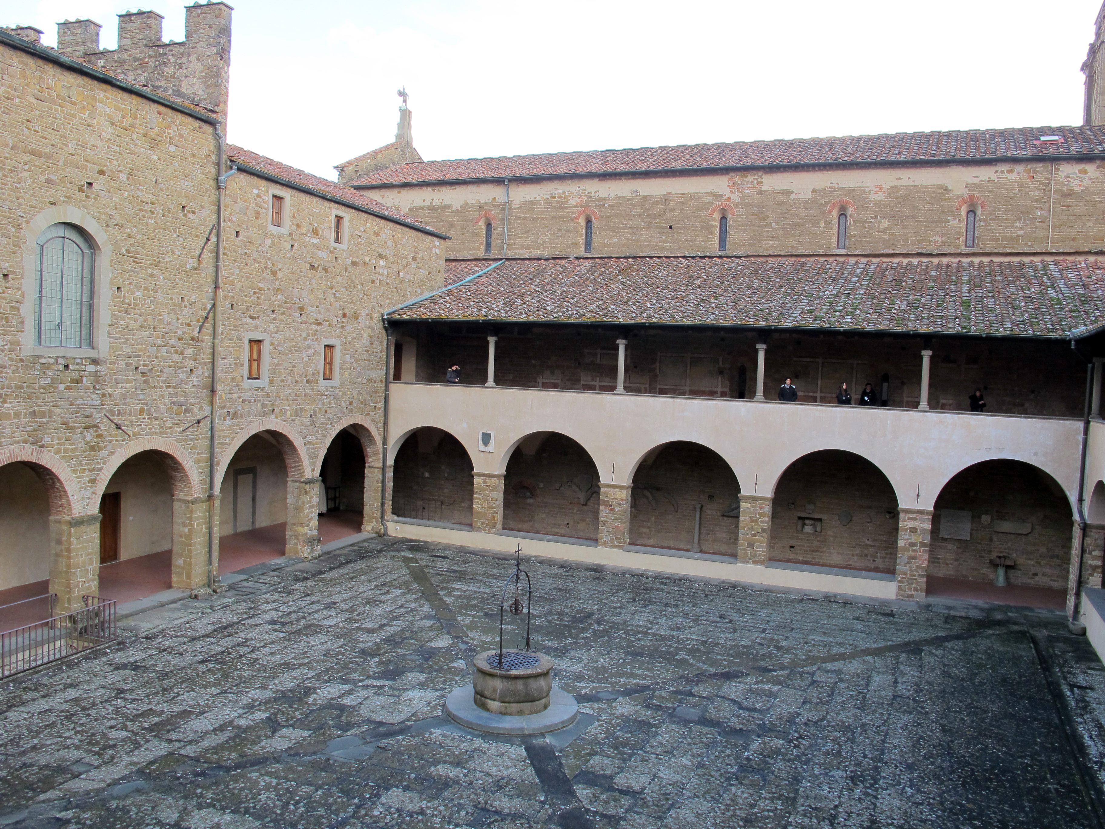 San Miniato al Monte, Firenze